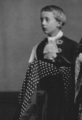 Фотография пажа Артур Понсонби и королевы Виктории (27 апреля 1882 года)